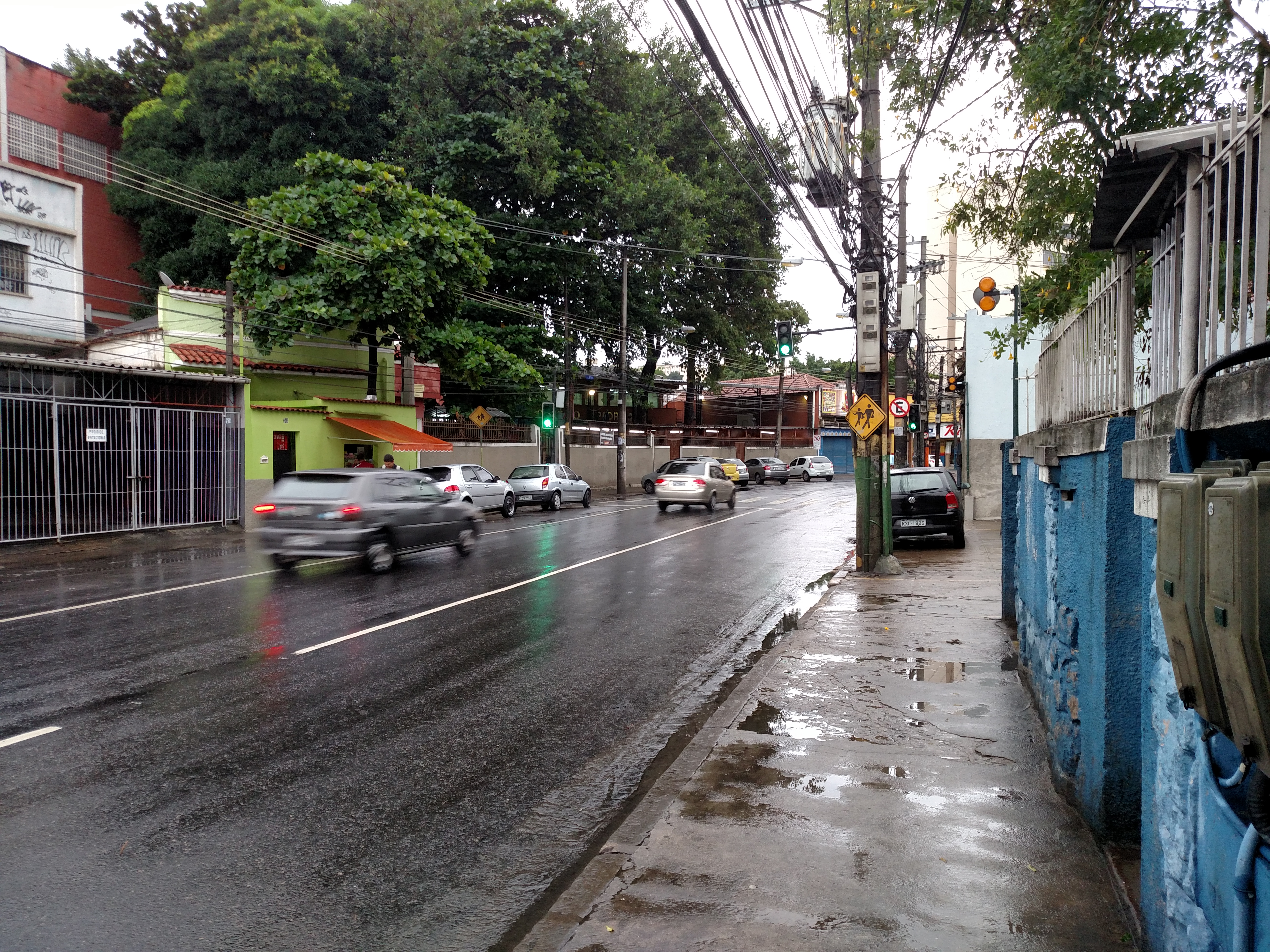 Colégio Pedro Segundo